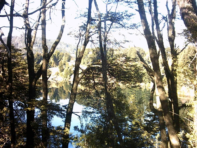 Bariloche (Argentina). Lago Nahuel Huapi